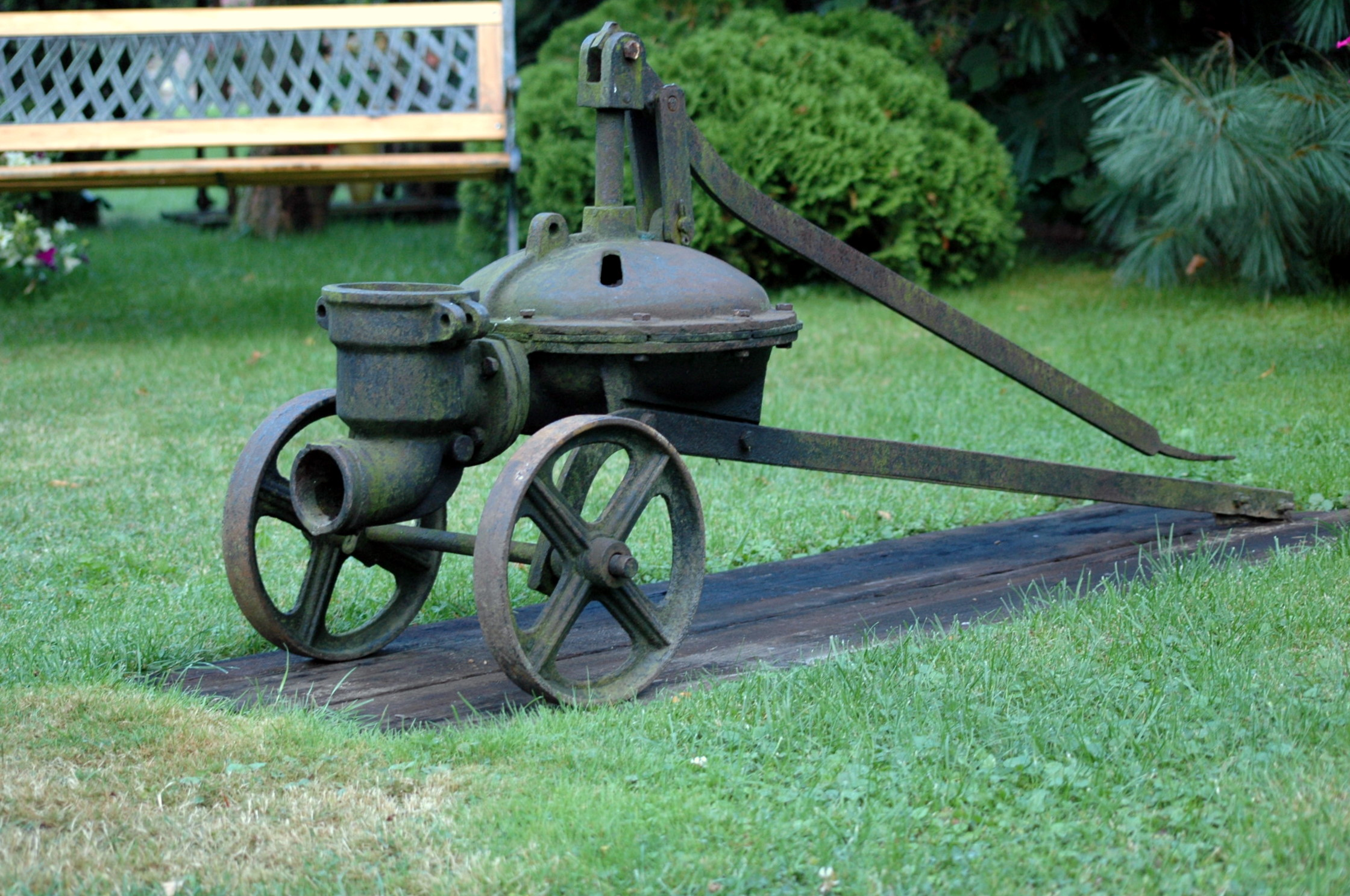 Pompa do odprowadzania ścieków